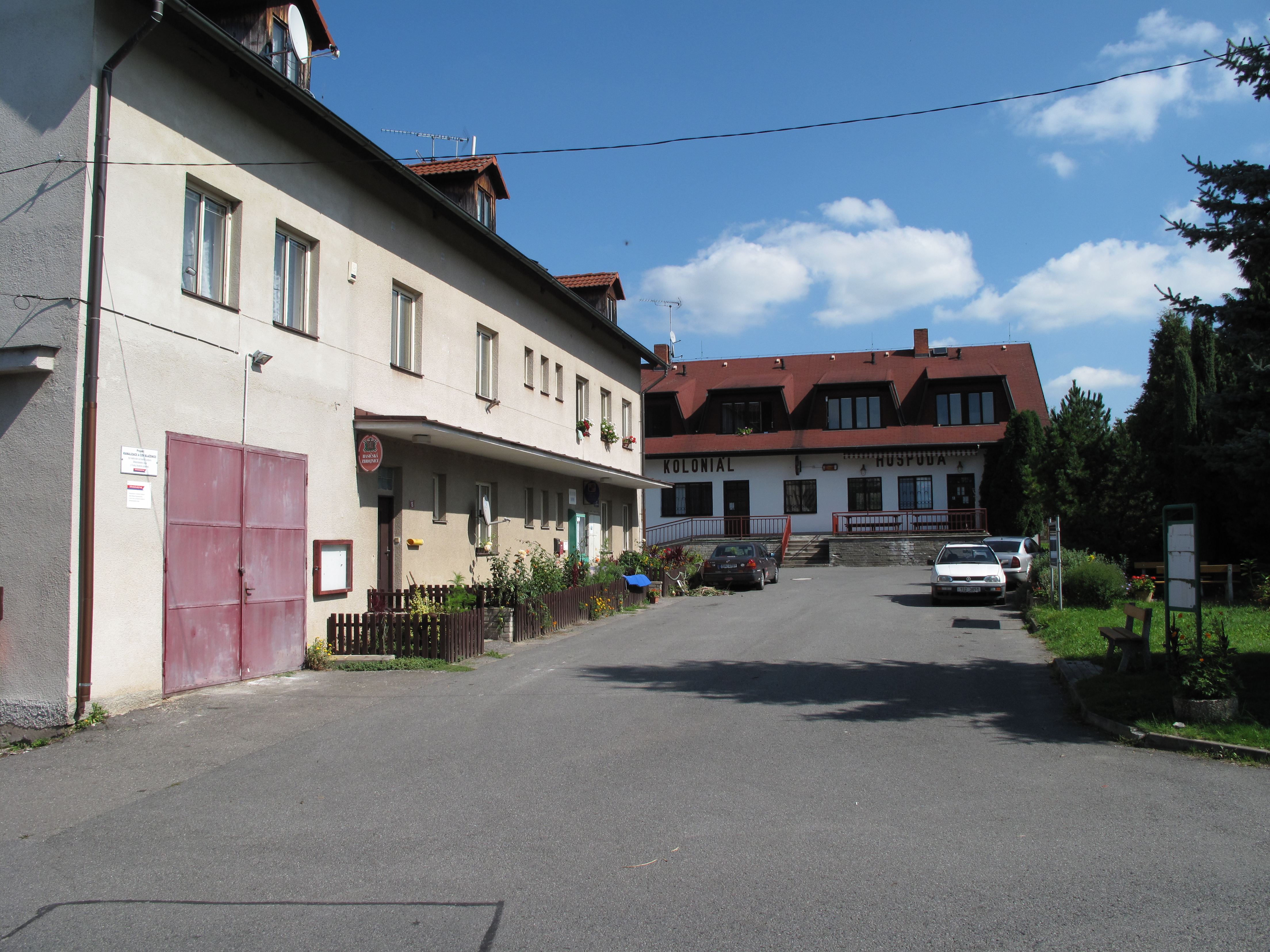 Obecní úřad v Blaženicích. Okres Benešov, Česká republika.